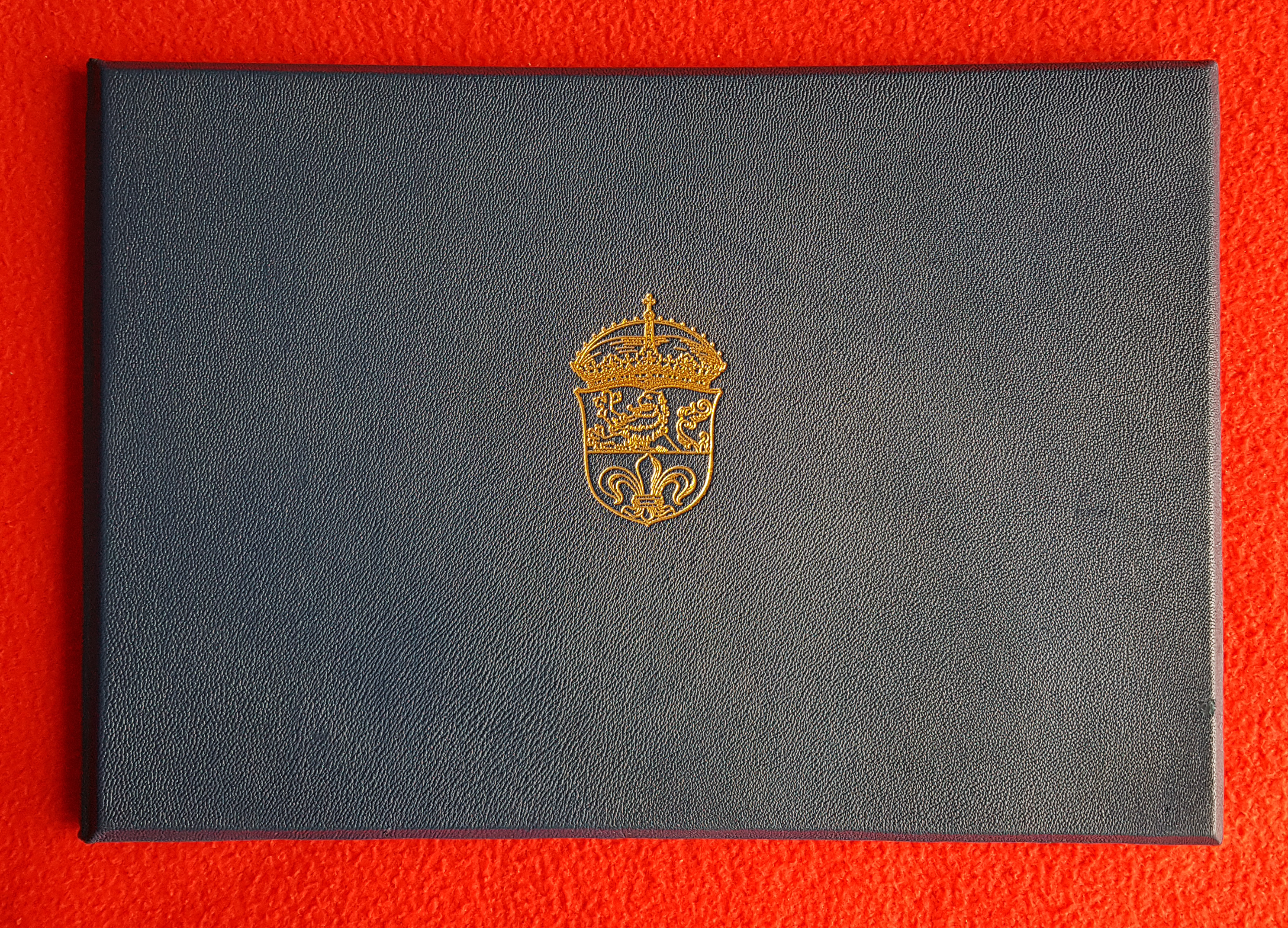 Die Silberne Verdienstplakette Darmstadt wurde mit einer Silbermünze und einer Urkunde verliehen. Hier: Einband der Urkunde für Prof. Dr. Hans-Gerhard Evers, 1965